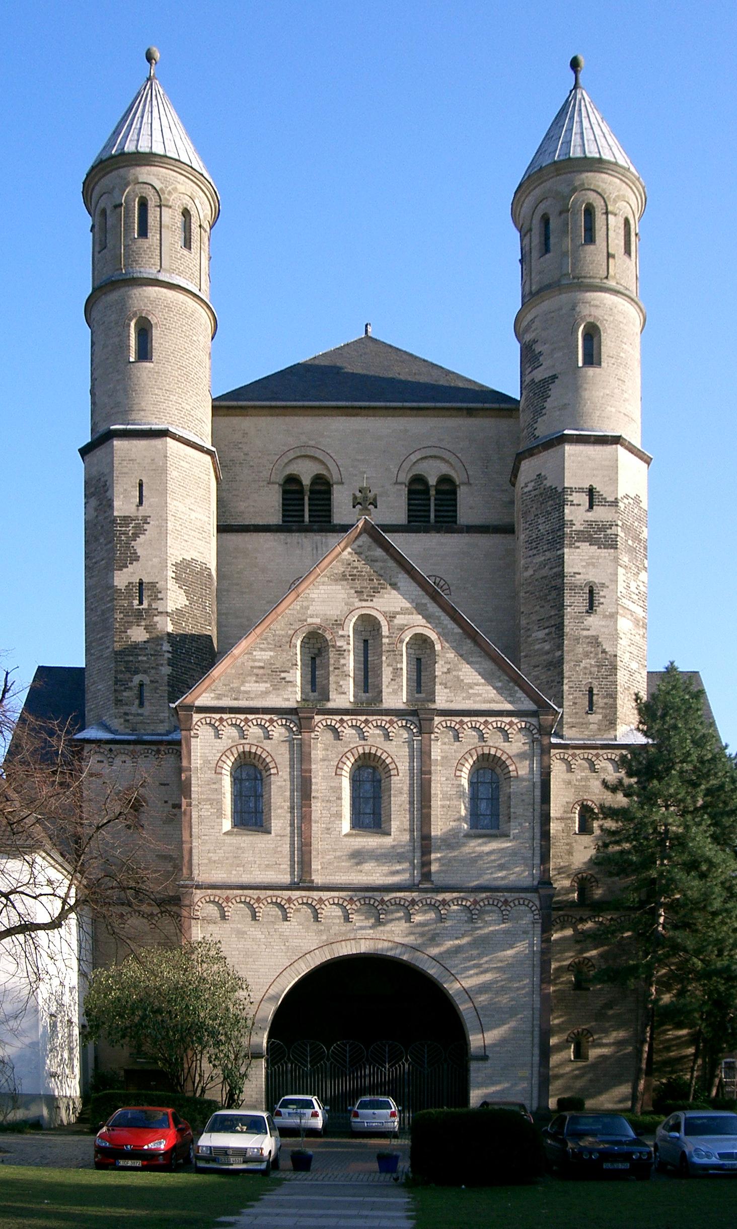 Köln St. Pantaleon, Ansicht von West.